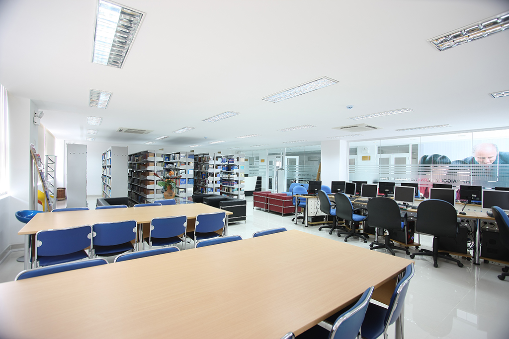 Thư viện Alexandria